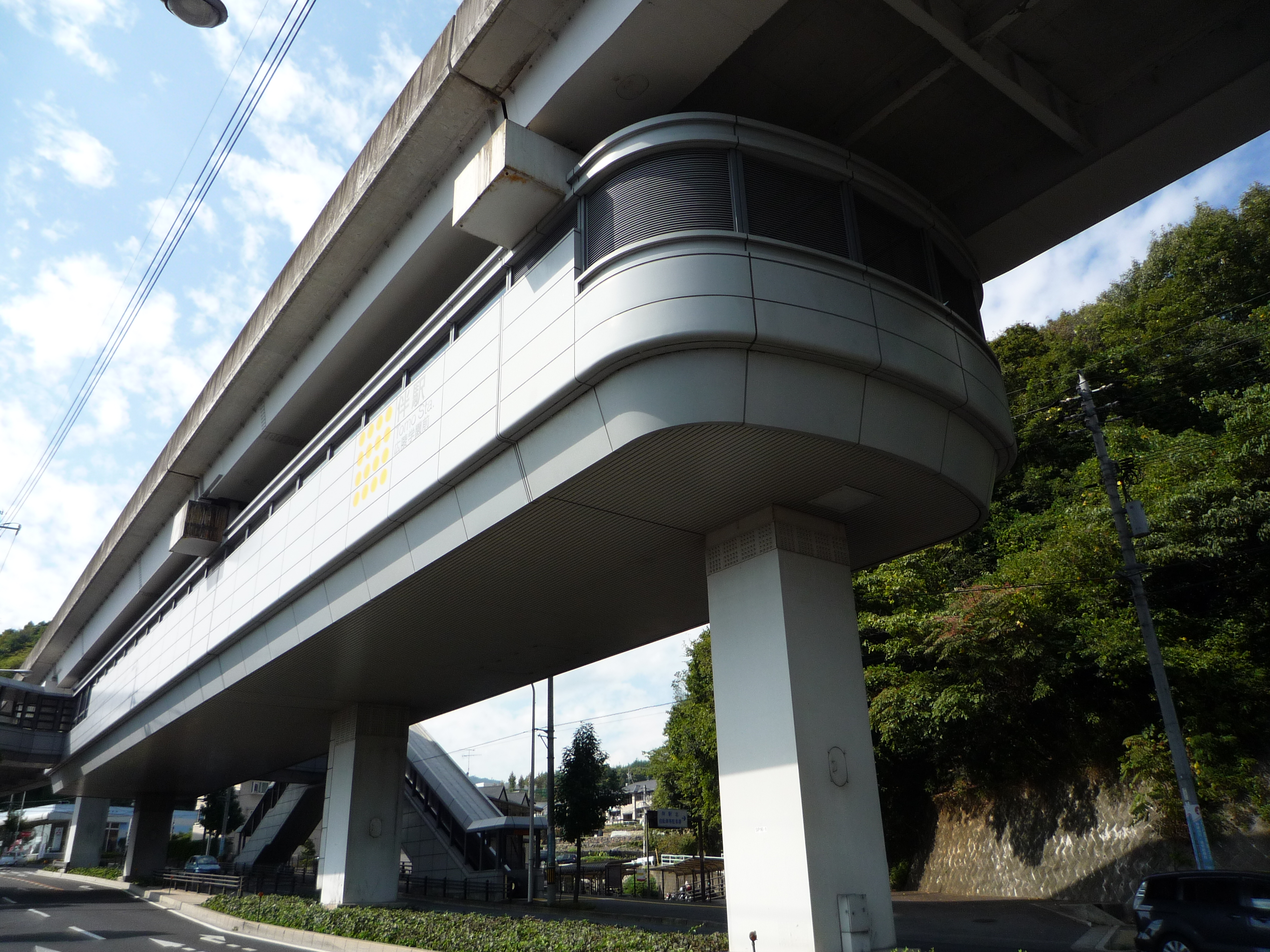 伴駅